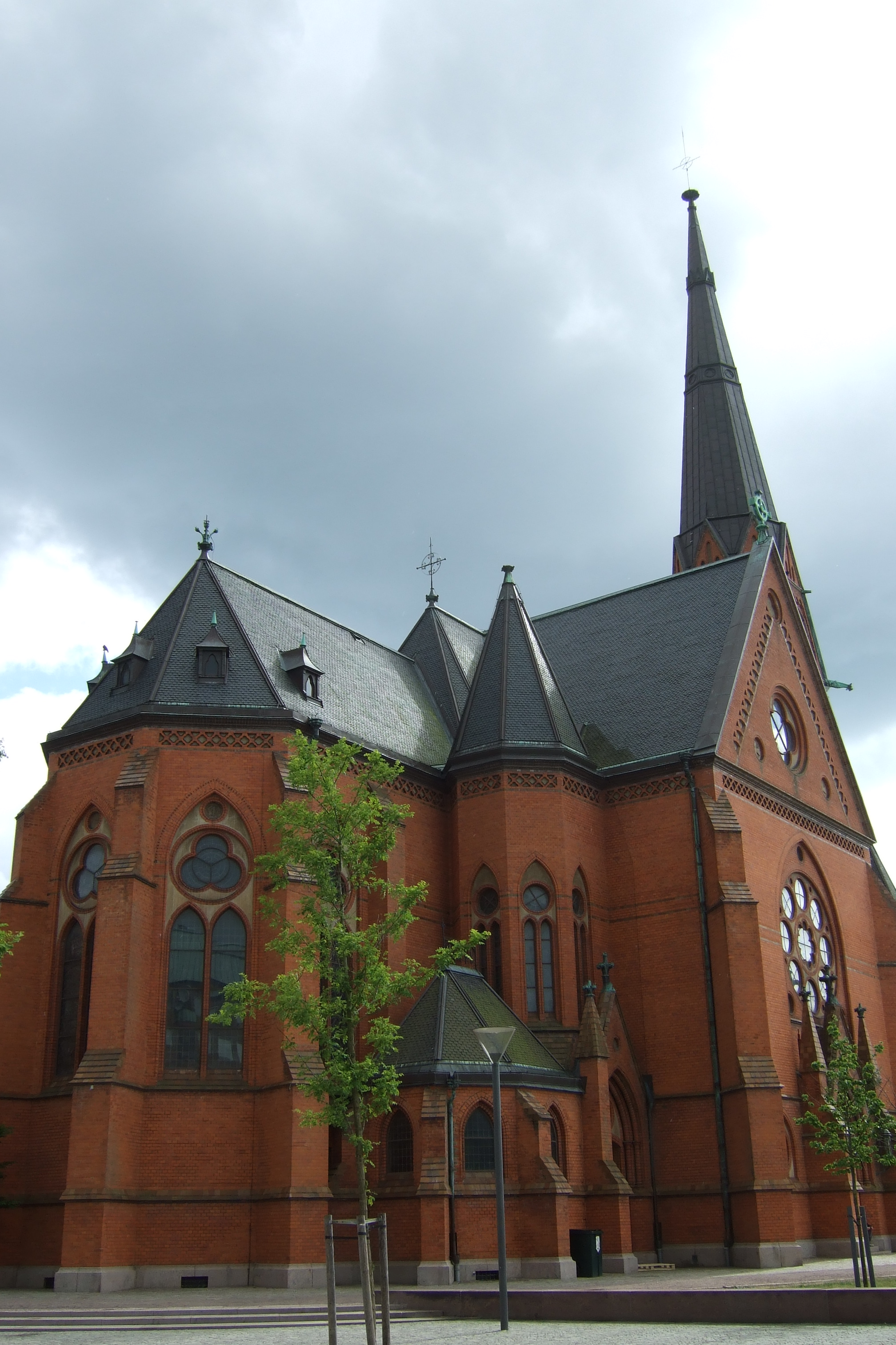 Zona absidale della Gustav Adolf kyrka durante l'estate (Helsingborg, Svezia)